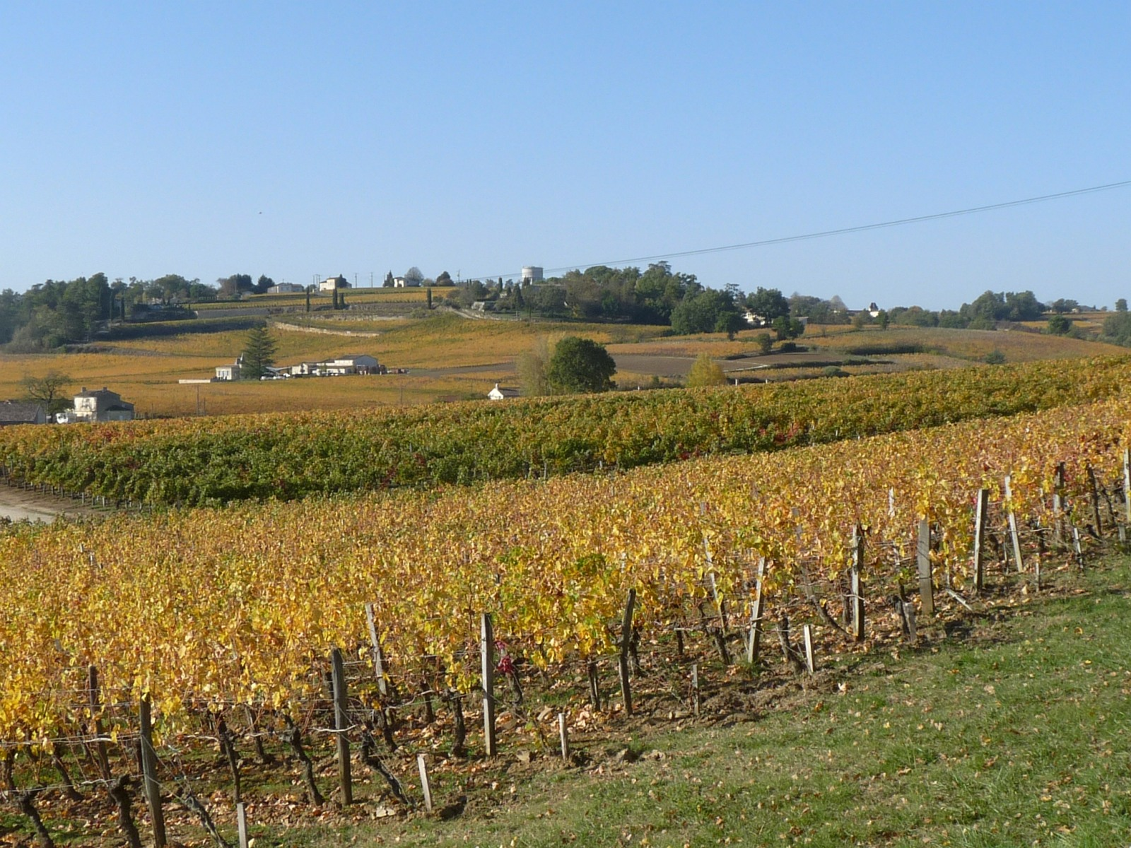 Vignoble de St-Emilion, St-Hippolyte, Gironde, France